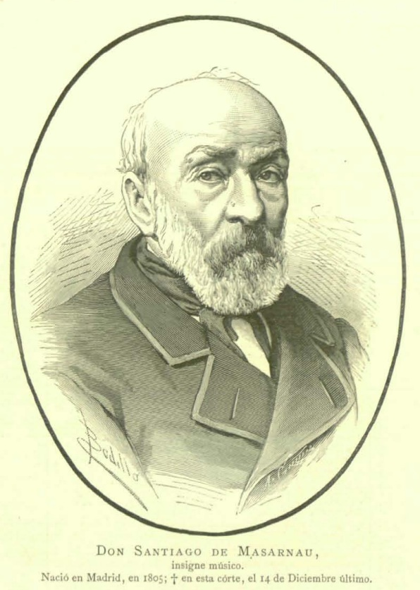 D. Santiago de Masarnau, insigne músico. Nació en Madrid en 1805, falleció en esta corte, el 14 de diciembre último.